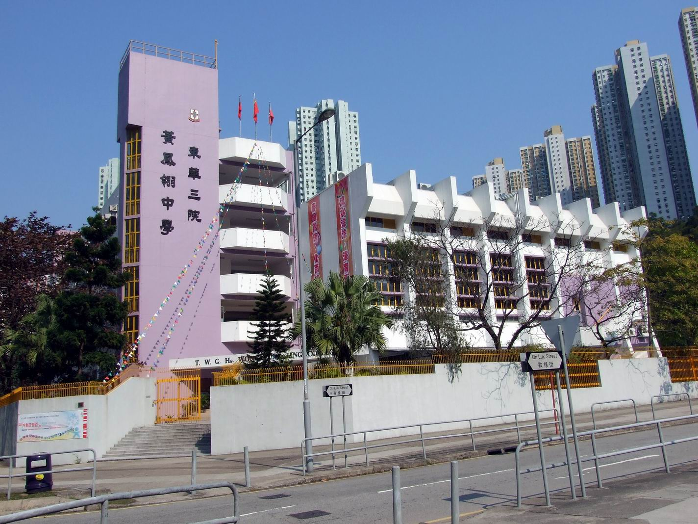 東華三院黃鳳翎中學